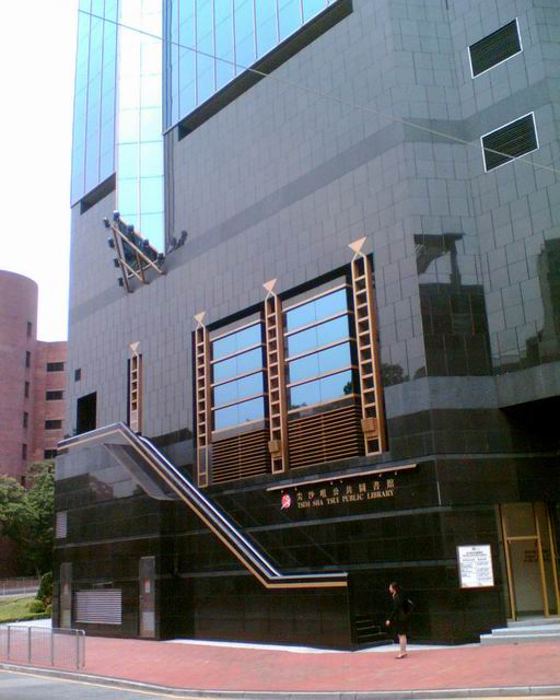 尖沙咀公共圖書館